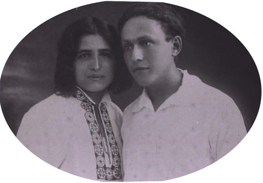 שושנה ואברהם קליינר בשנות העשרים בתלבושת חלוצית